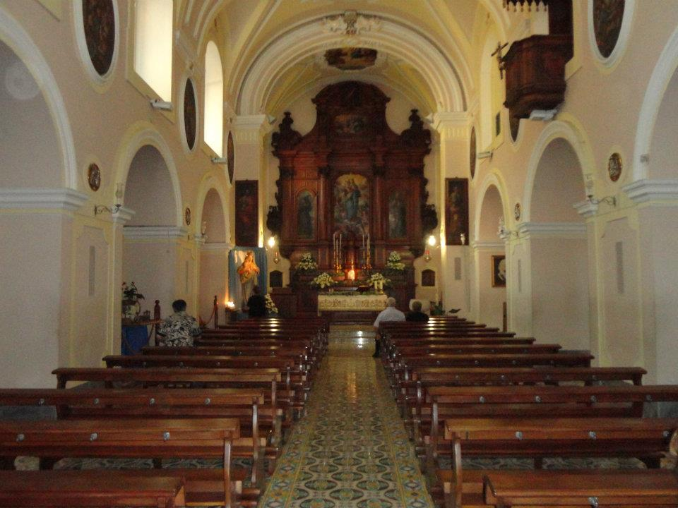 Interno del Santuario della Madonna delle Grazie Avellino